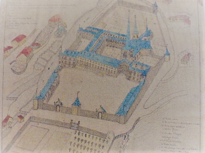 Dessin de la 2ème abbaye, reconstruite dans la première moitié du XVIIIème et détruite dans la seconde moitié du XVIIIème siècle